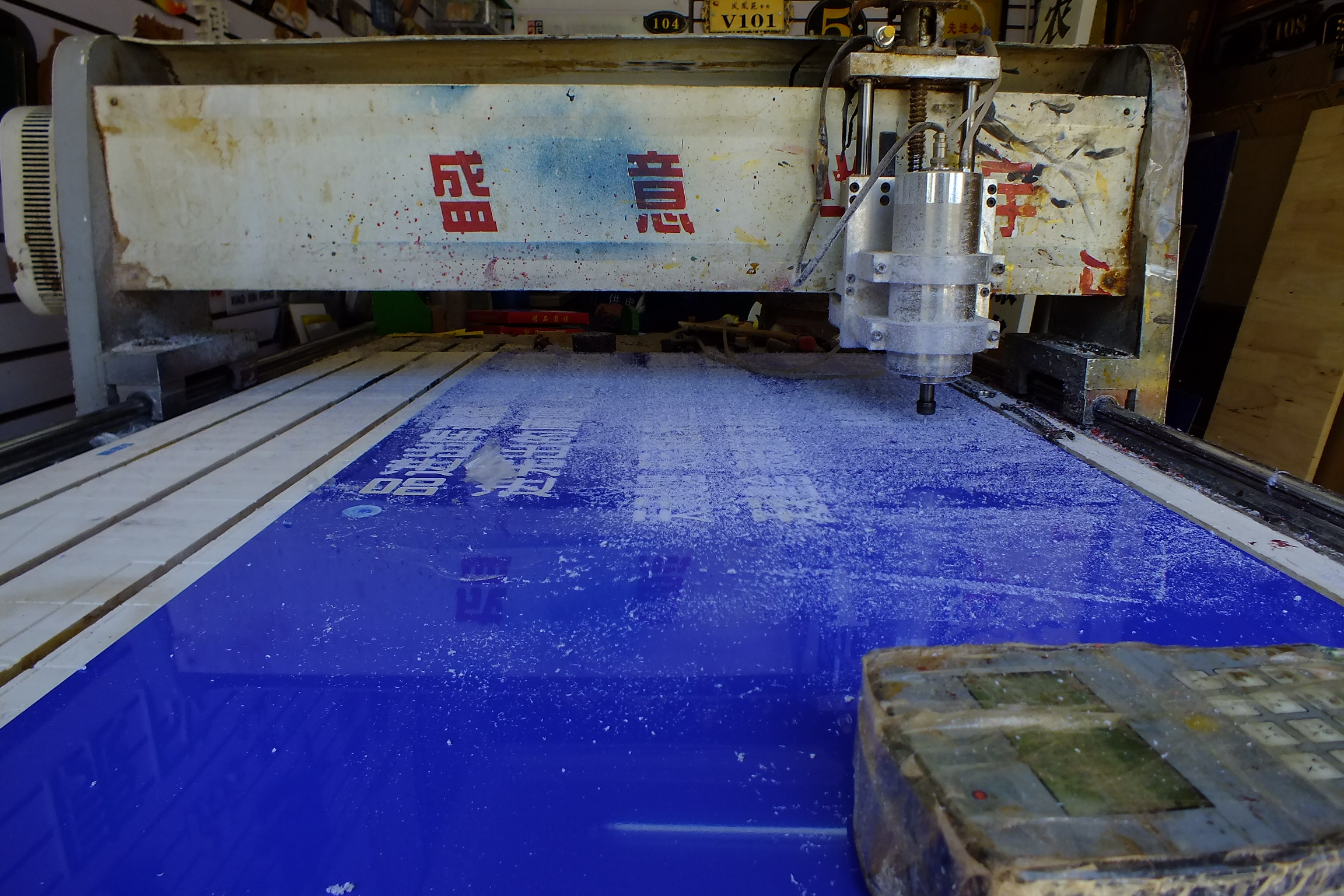 2015-03-20 Wuhua District, Yunnan, Kunming(雲南省昆明市五華区, 中国) 五华区文庙直街